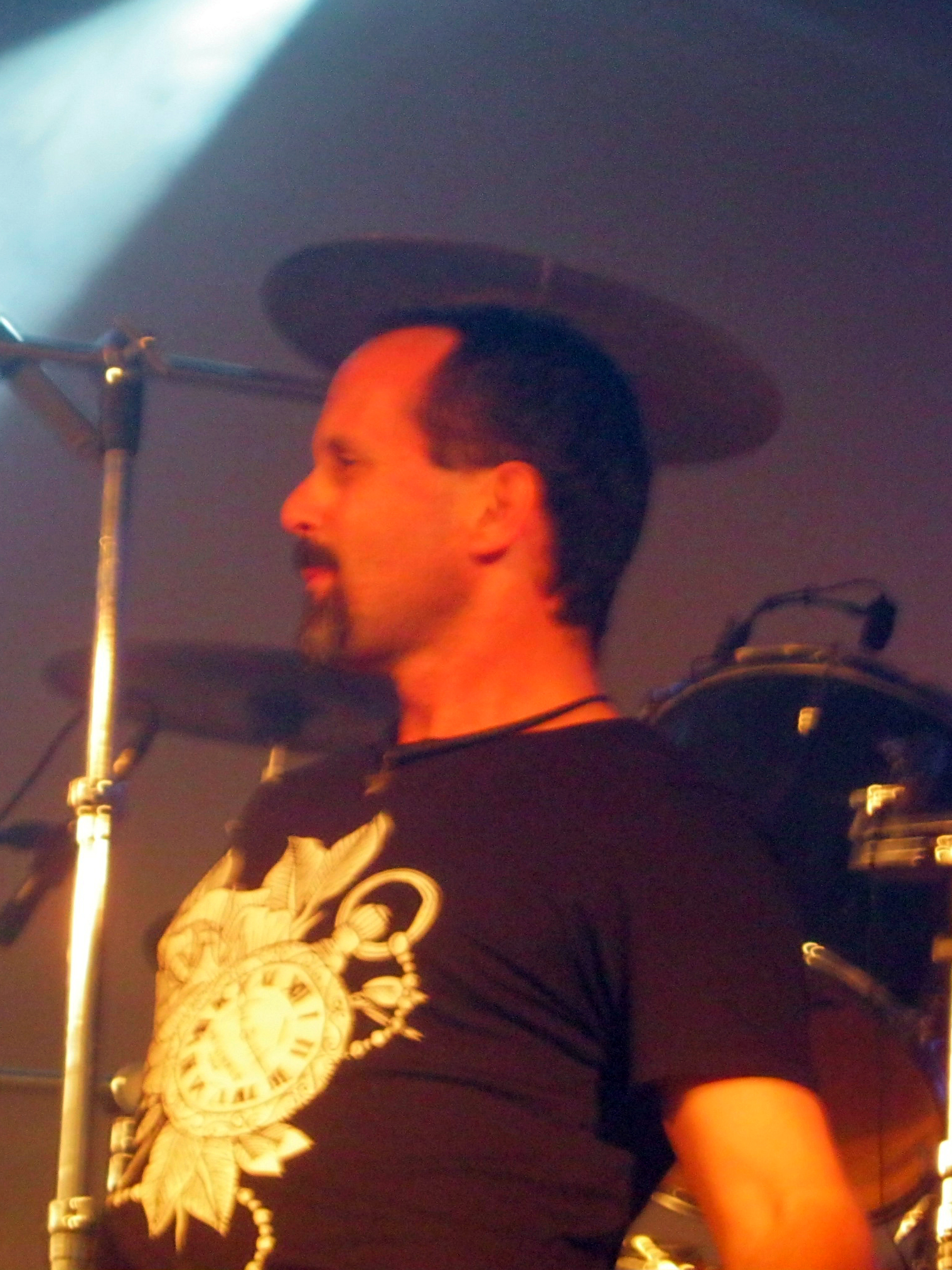 The metal band form Israel "Metal Scent" on 2015